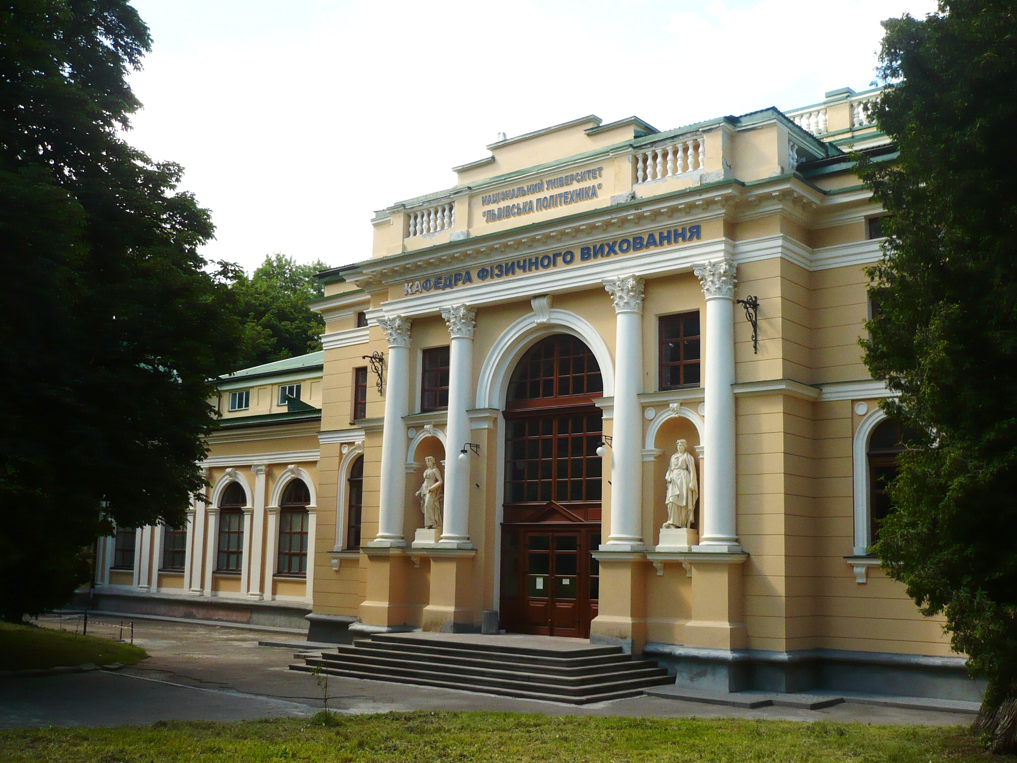 Lwów. Pałac Sztuki w Parku Stryjskim